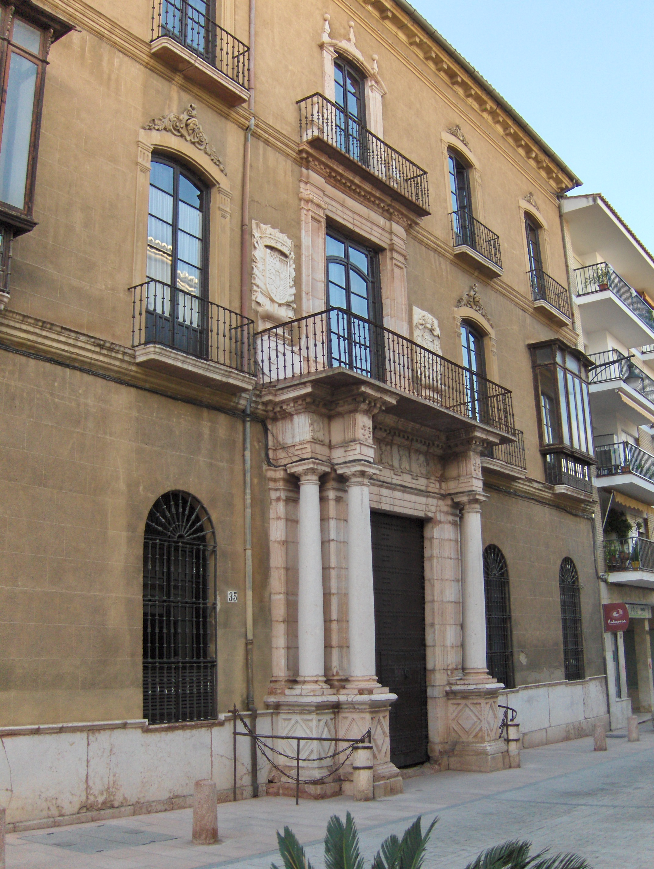 Palacio del Marqués de Villadarias, Antequera, España.